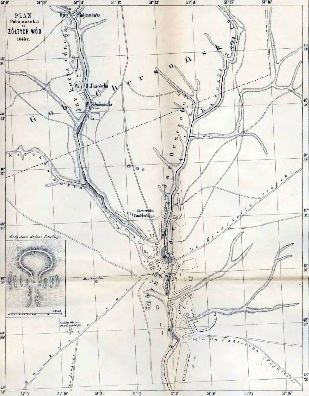 Pole bitwy u Zóltych Wód stoczonej w maju 1648